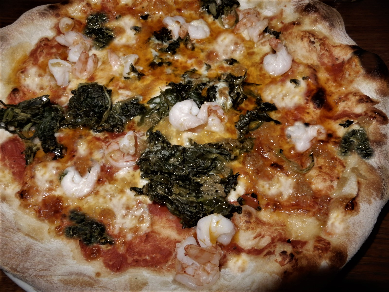 Pizza mit Gambas, Spinat und Knoblauch